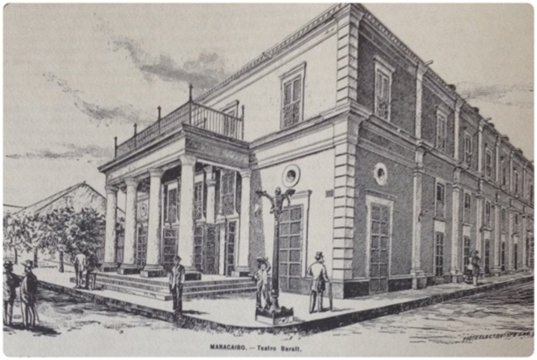 Edificio original del Teatro Baralt de Maracaibo, inaugurado en 1883. Grabado dibujado por el editor y periodista Eduardo López Rivas y publicado en la revista "El Zulia ilustrado".